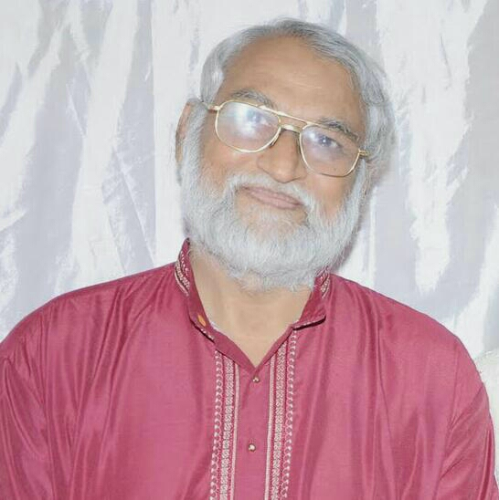 जगदीश काबरे सर